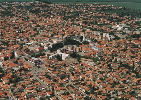 Mezőkövesd, Hungary, aerialphotography